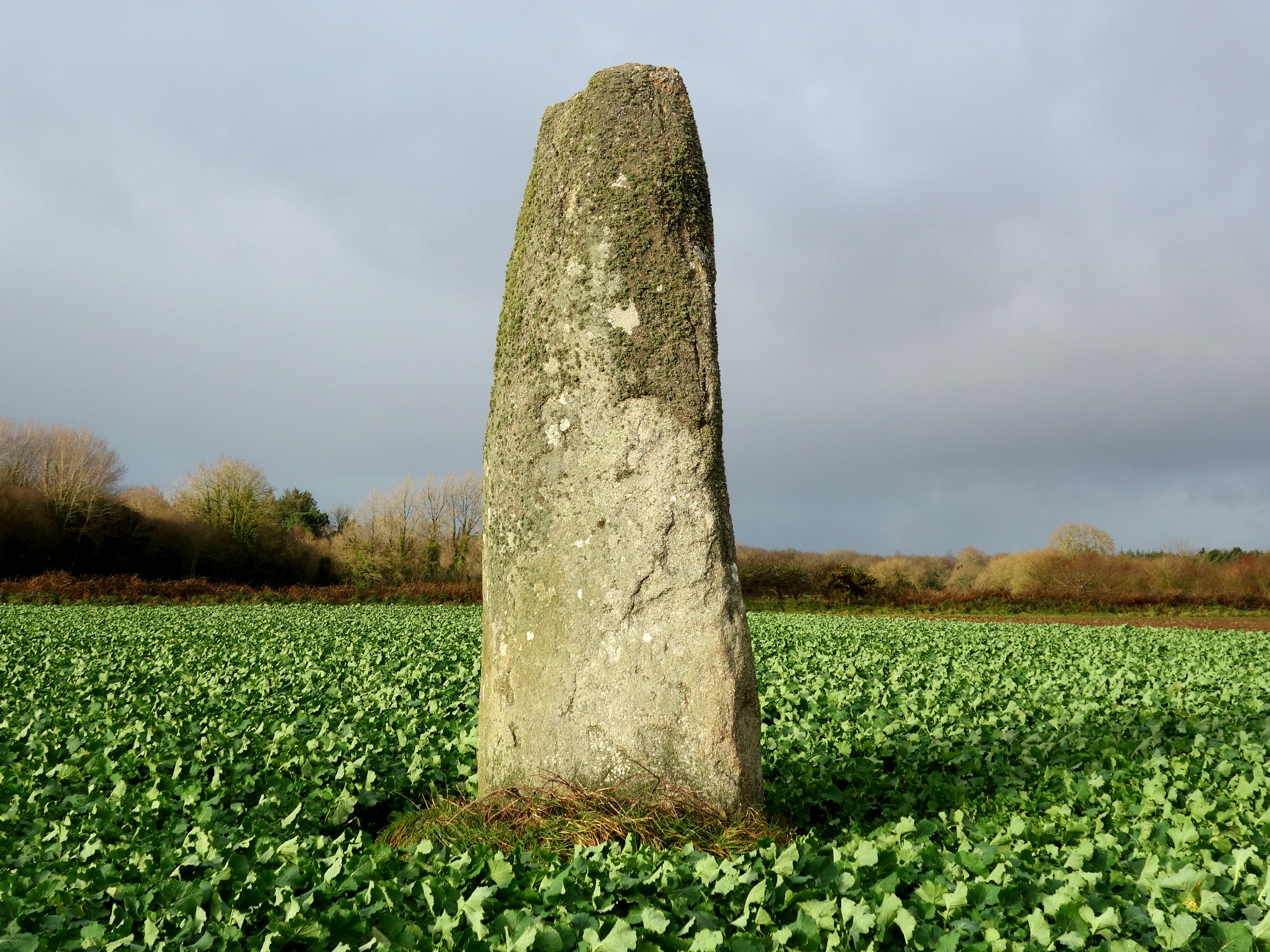 Un beau menhir en granite de près de 5 mètres de haut - Janvier 2018